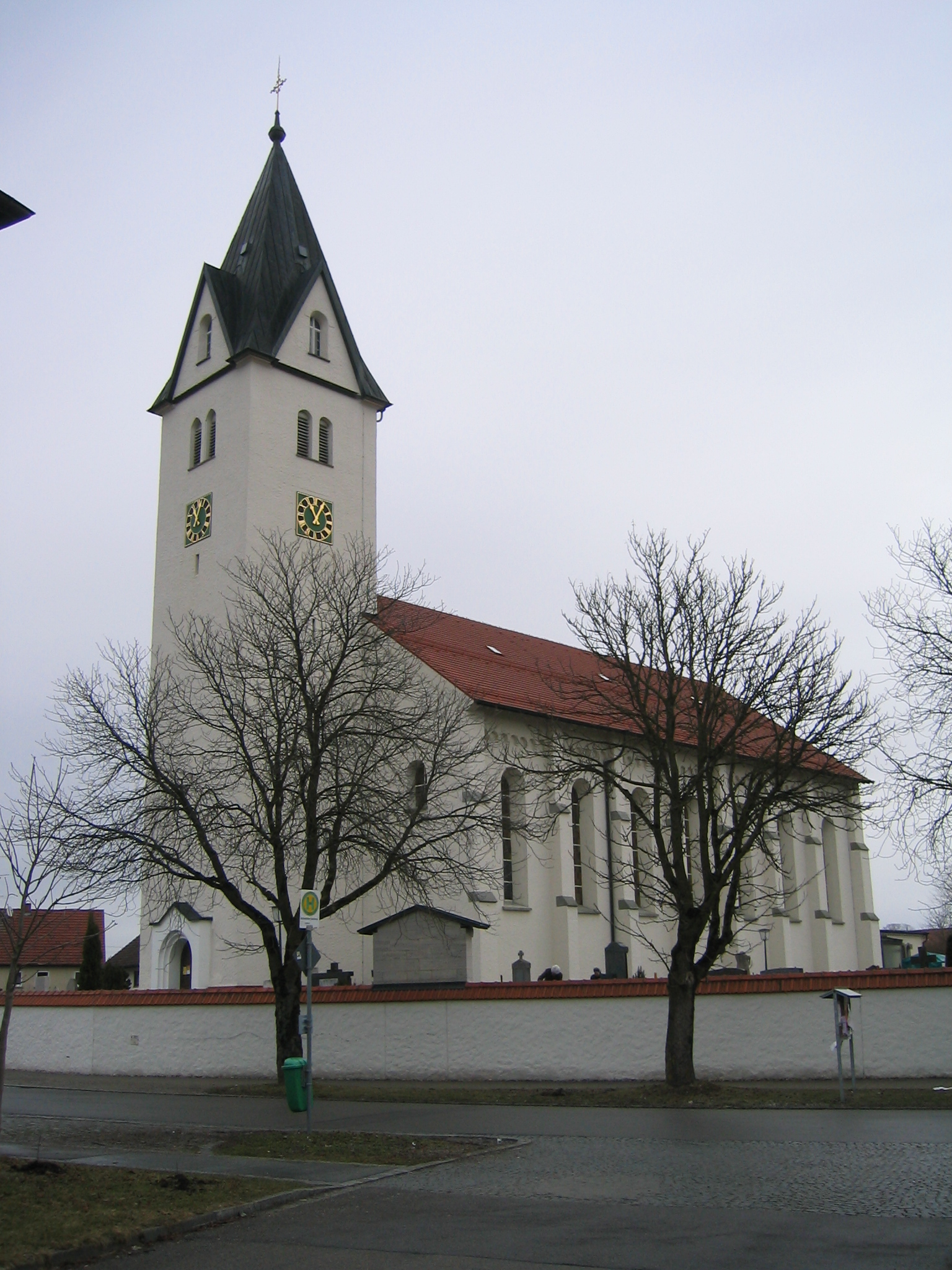 Kath. Pfarrkirche St. Michael in Aichstetten